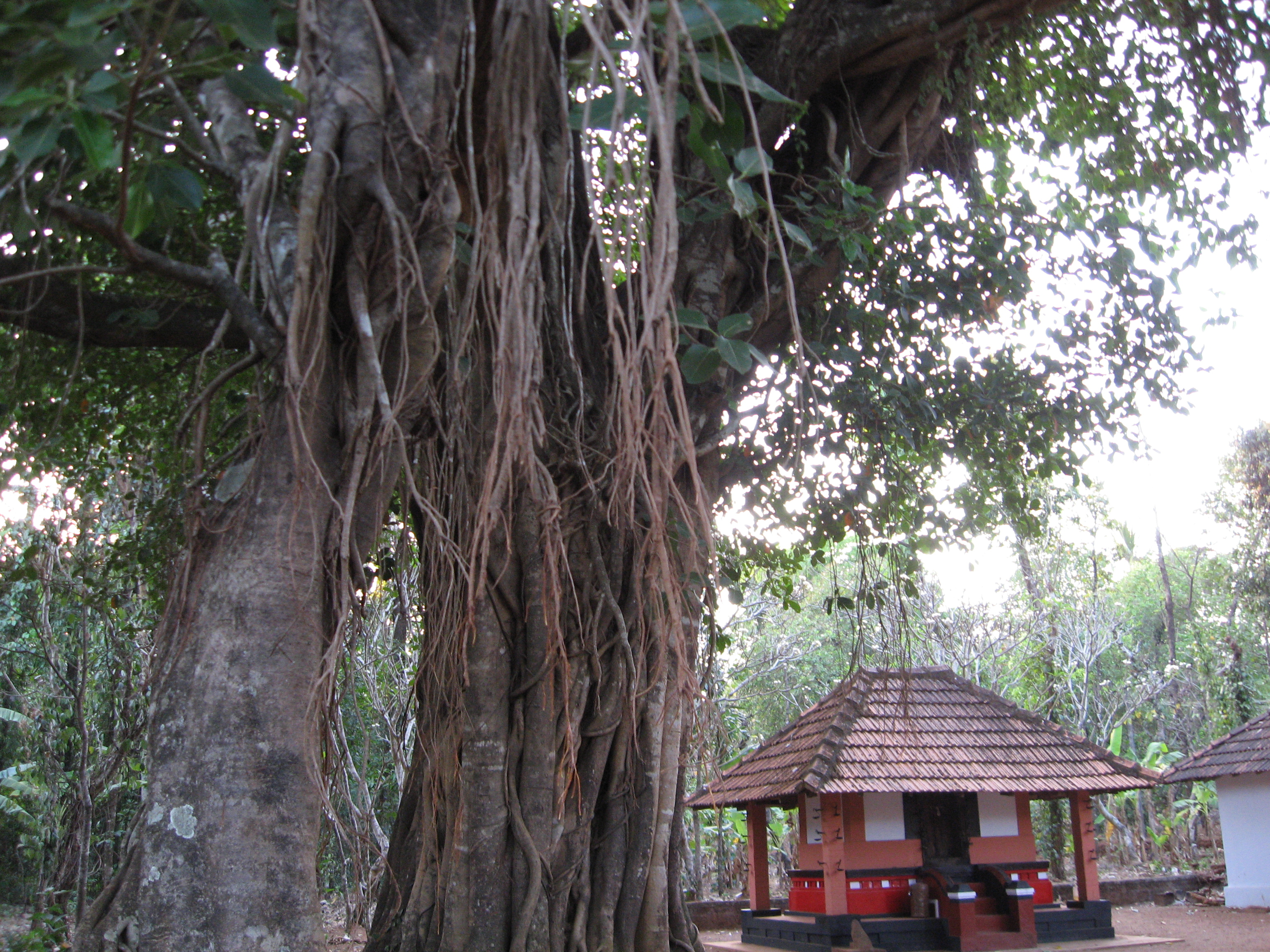 ബ്ലാത്തൂർ ഭൈരവൻ കോട്ടം